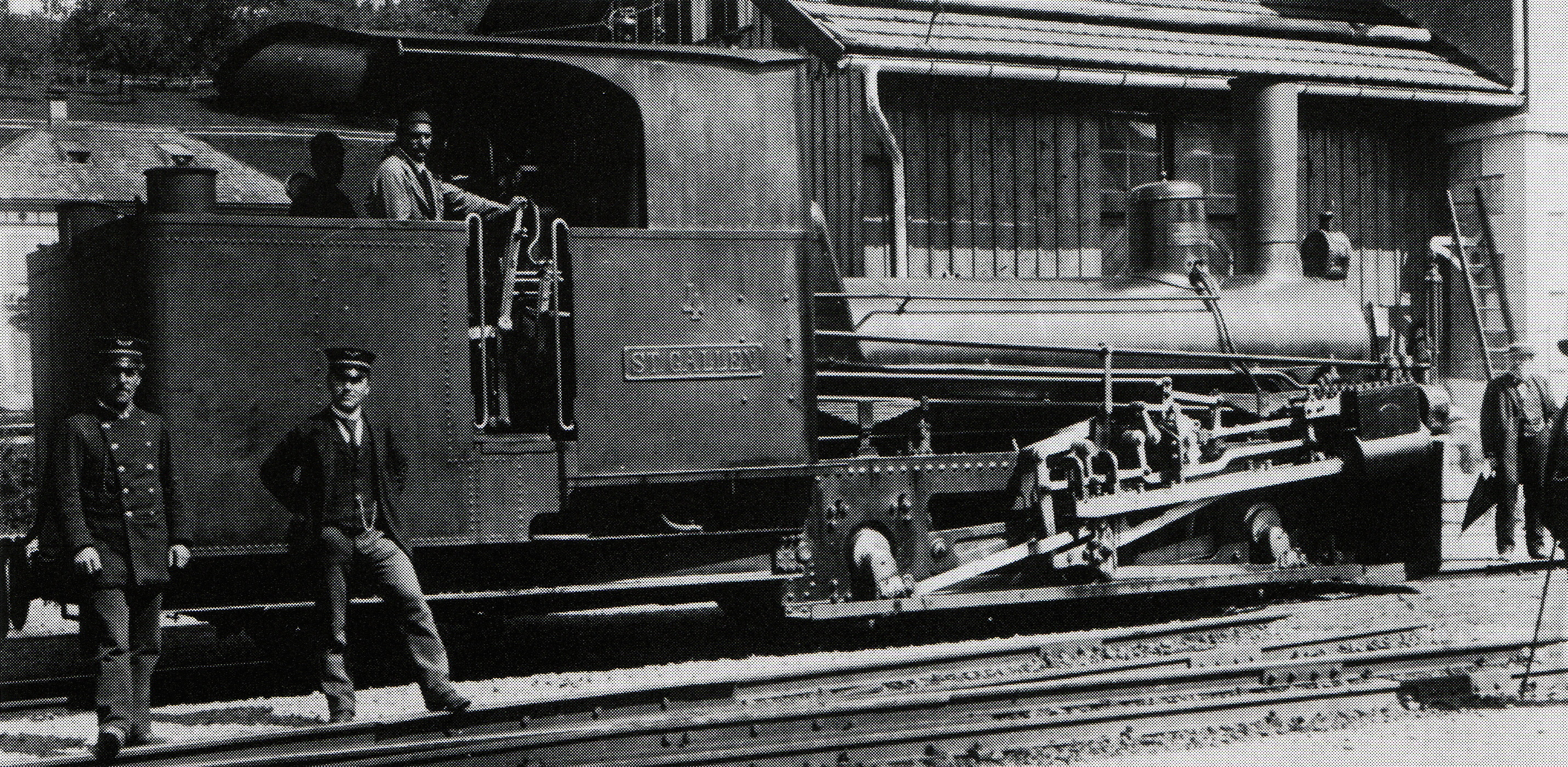 Zahnradlocomotive (System Riggenbach-Klose) HG 2/3 Nr. 4 St. Gallen der Appenzeller Straßenbahn, gebaut 1890 inn der Schweizerischen Locomotiv- und Machines-Fabrique zu Winterthur (Fabr.-Nr. 636), 1930 außer Dienst gestellt und anschließend abgebrochen.